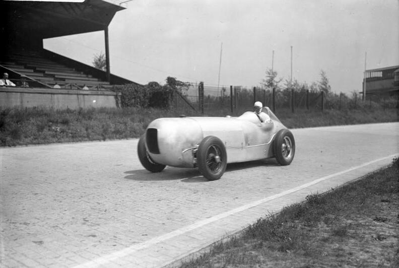 Das erste grosse Training auf der Avus zu dem grössten internationalen Automobilrennen der Welt ! Der Rennfahrer von Brauchitsch durchrast mit seinem Rennstromlinienwagen im 200 Klm Tempo die Nordkurve der Avus.